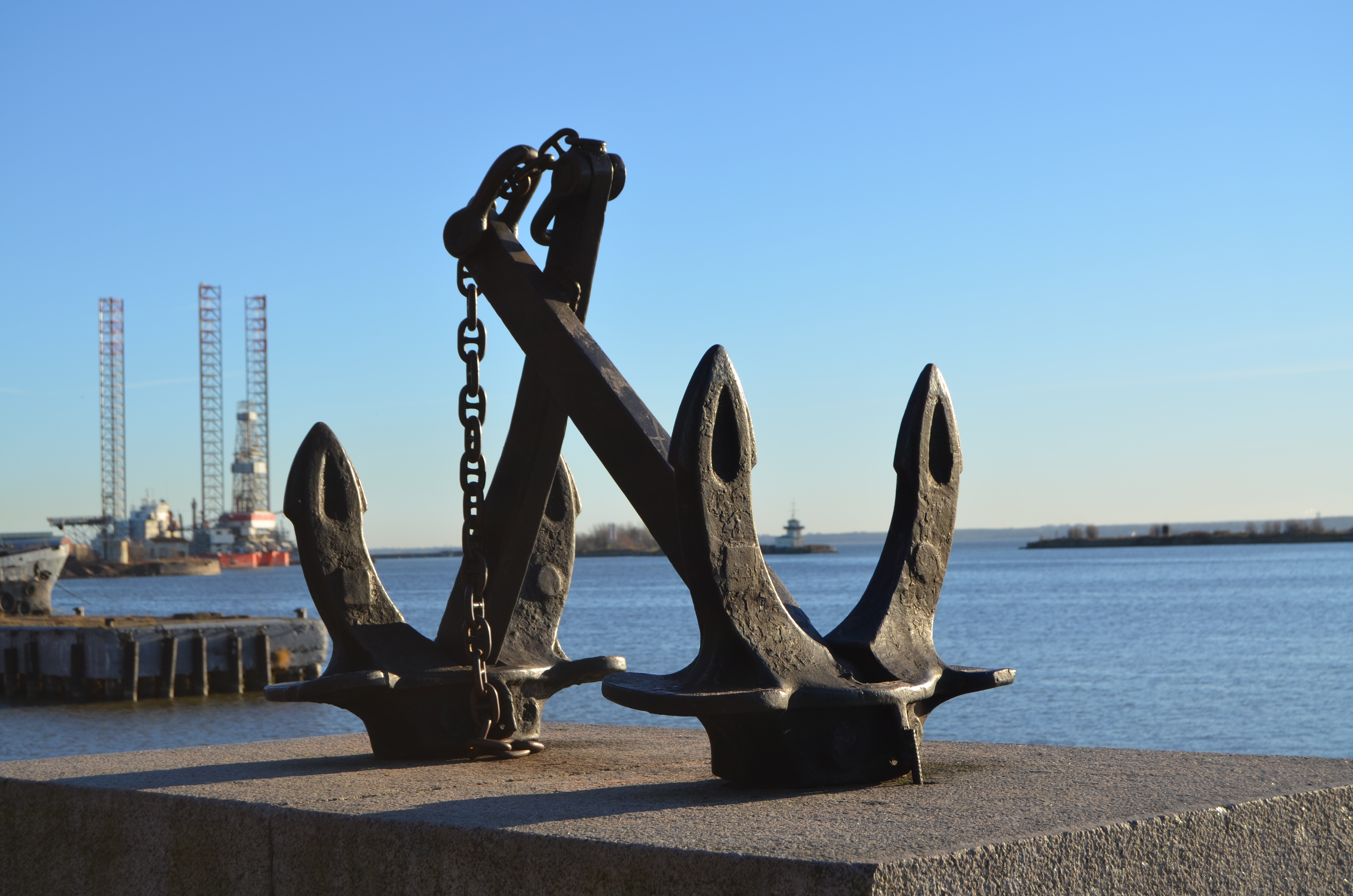 Кронштадт, Набережная. Ноябрь 2015